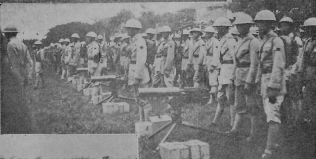 1930年代廣西民團照片